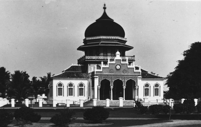 Foto. De Baiturrahman moskee in Koetaradja